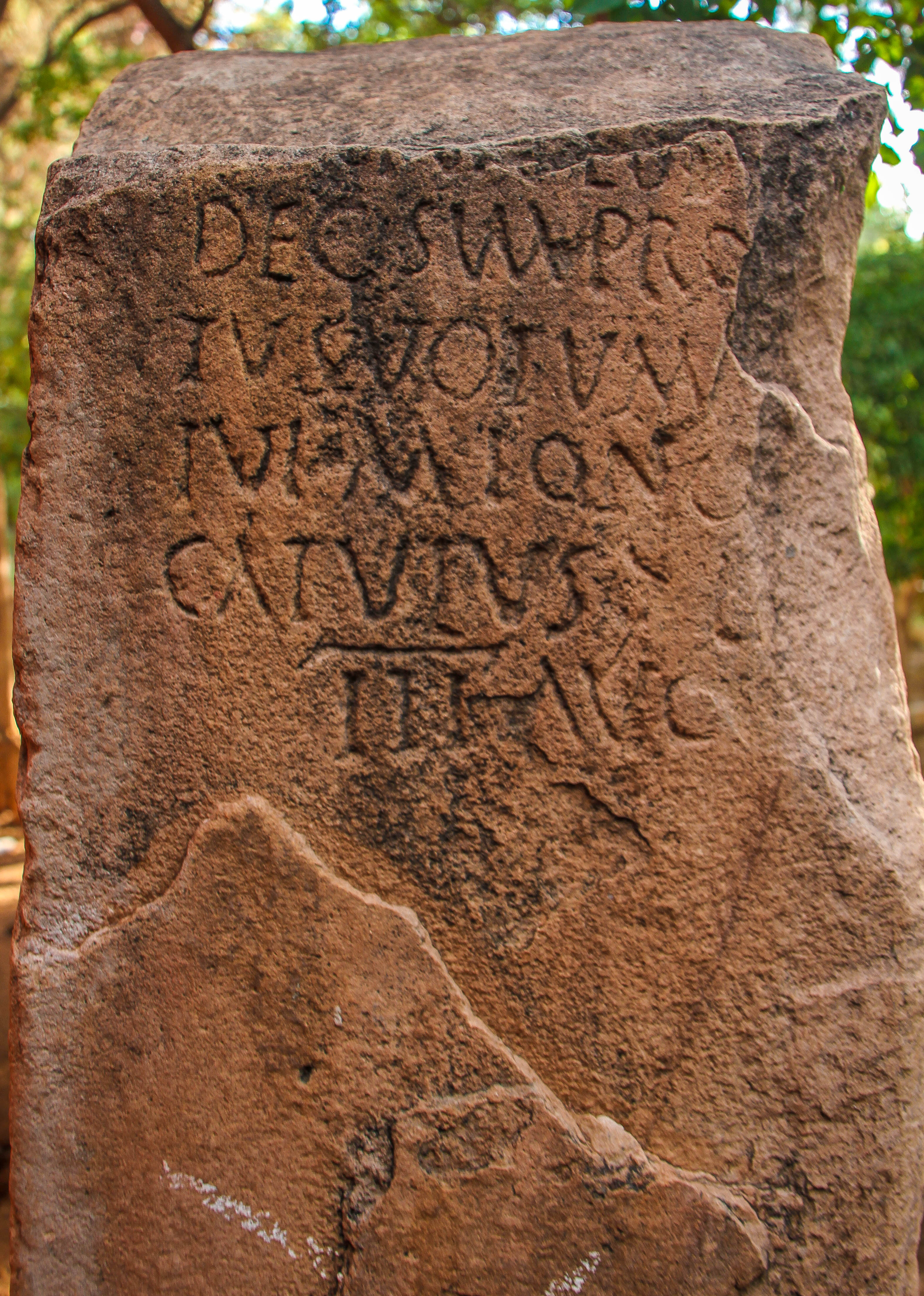 Photo de la partie inférieure de la face latérale de l'inscription romaine d'Agueneb exposée dans le jardin public d'Aflou, Wilaya de Laghouat, Algérie. Transcription du contenu